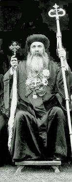 സ്വതന്ത്രാനുമതിയുള്ള ചിത്രത്തില്‍ നിന്നും വെട്ടി എടുത്ത ചിത്രം, പശ്ചാത്തലത്തില്‍ മാറ്റങ്ങള്‍ വരുത്തിയിട്ടുണ്ട്